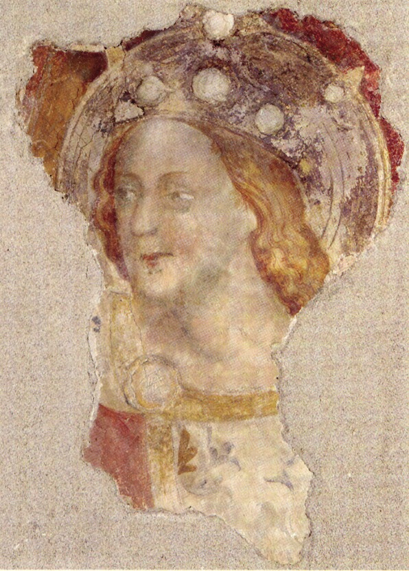 Testa di Cristo, lacerto di affresco di Domenico detto Domine del 1420 ca., salvato dalla distruzione dell€'abside della chiesa di S. Giusto nel 1843 (Trieste, Civico museo di storia e arte)